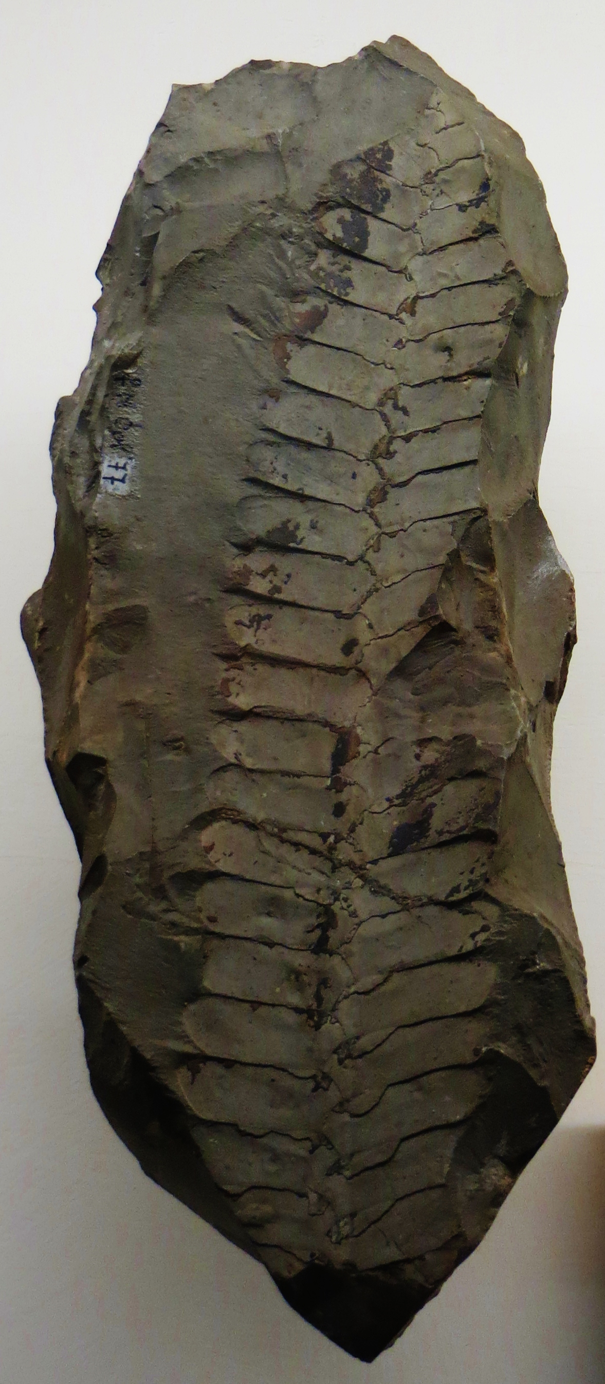 Fossil of Otozamites, an extinct plant- Took the photo at Museo di Storia Naturale di Verona